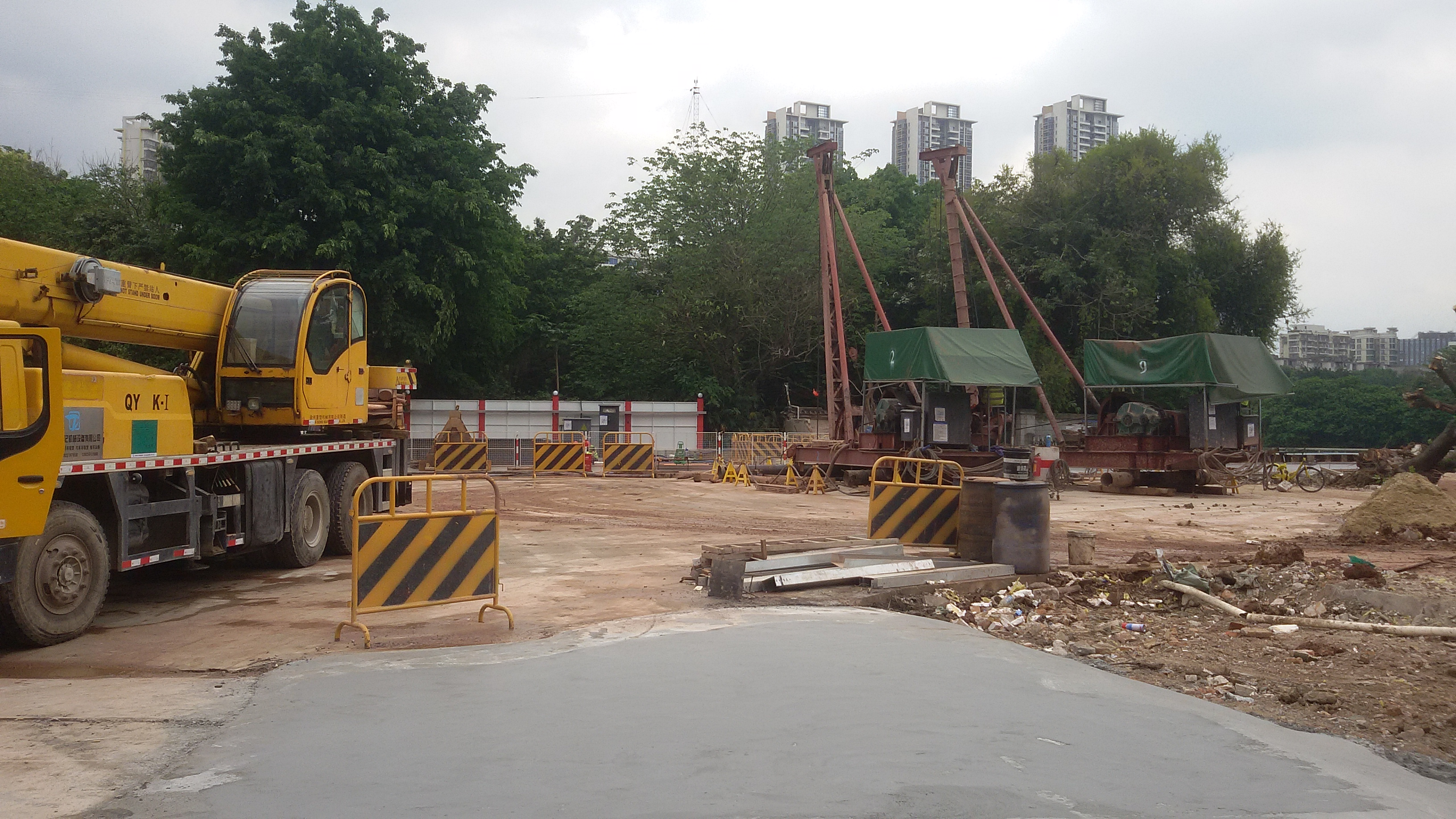 粵語: 彩虹桥站嘅广州地铁11号线施工工地